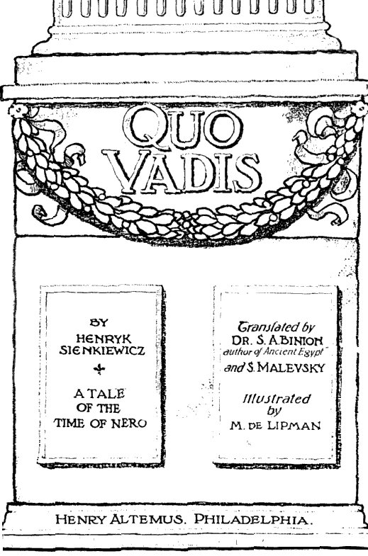 Title Page, Quo Vadis